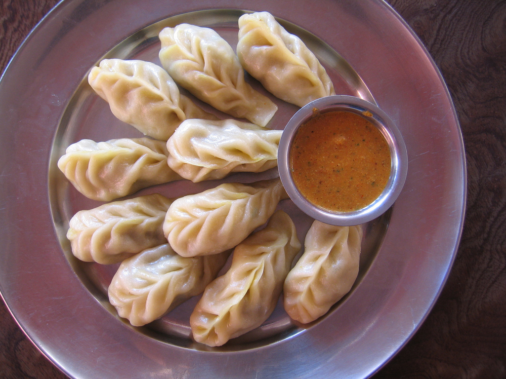 momo